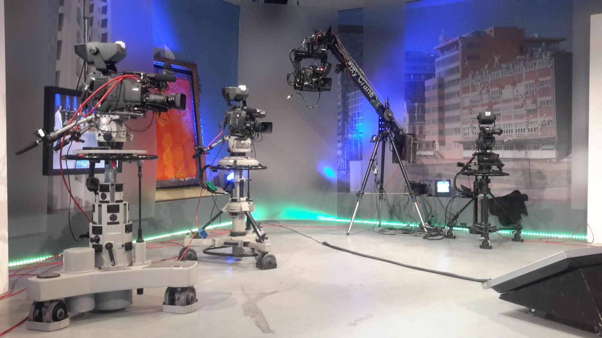 Studiokameras NRW.TV